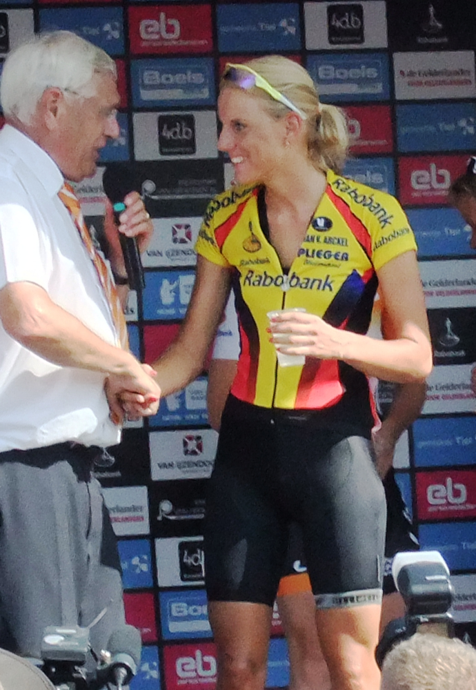 Moniek Tenniglo bij het damescriterium, Profronde van Tiel 2014